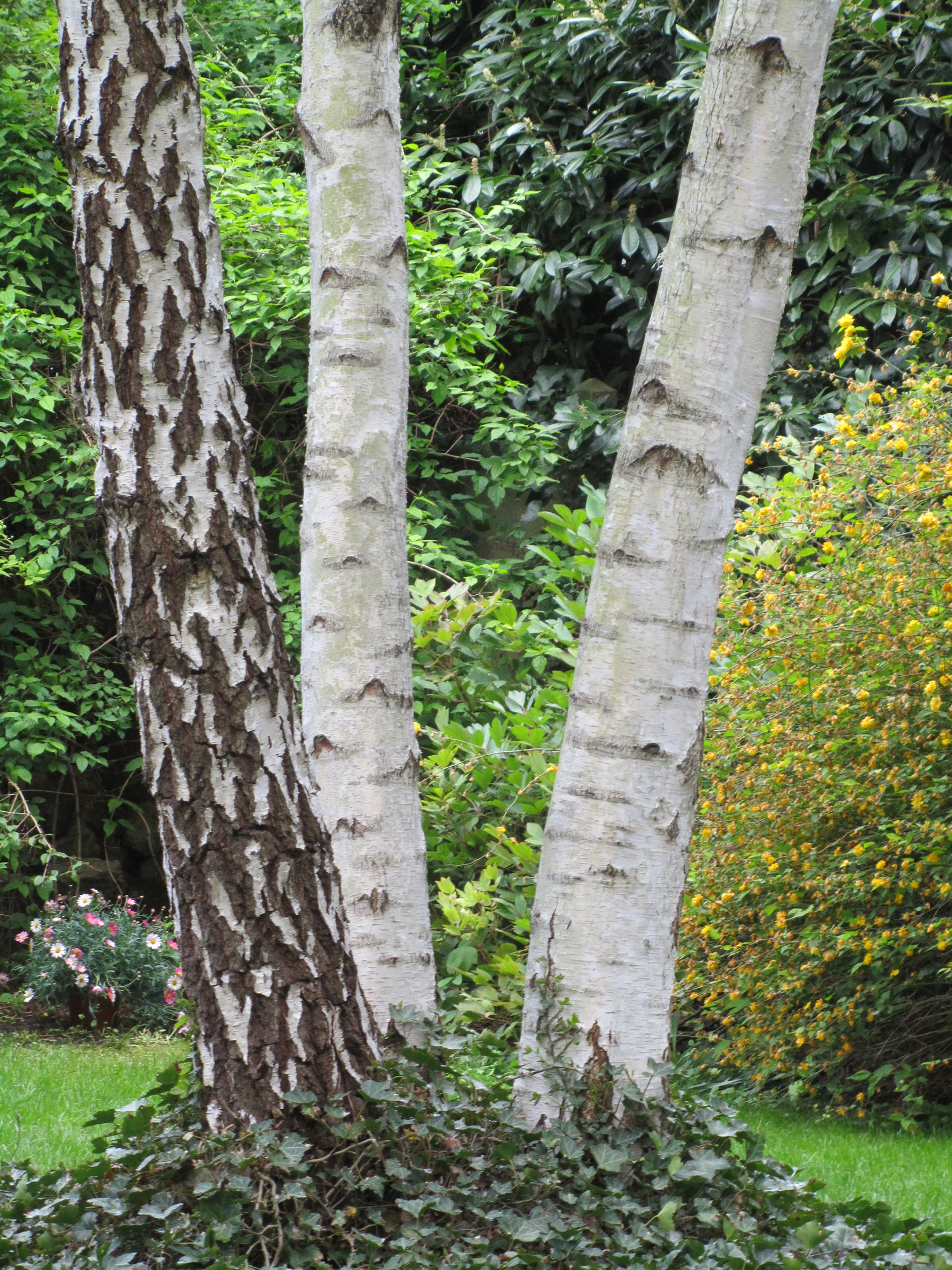 Cépée de Bouleaux verruqueux plantés par trois